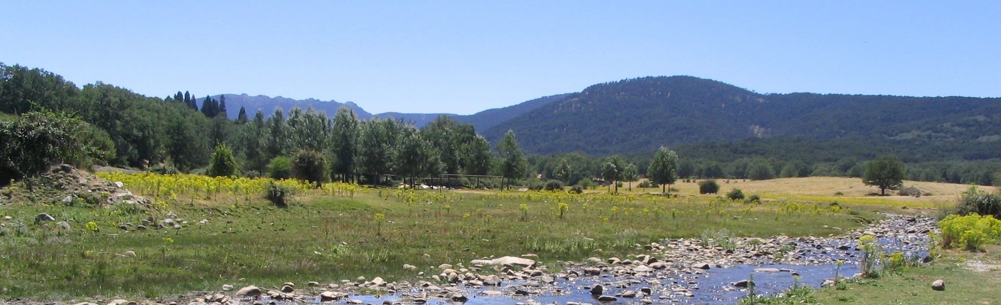 Valle de Valsaín con el río Eresma en primer plano, provincia de Segovia, España.